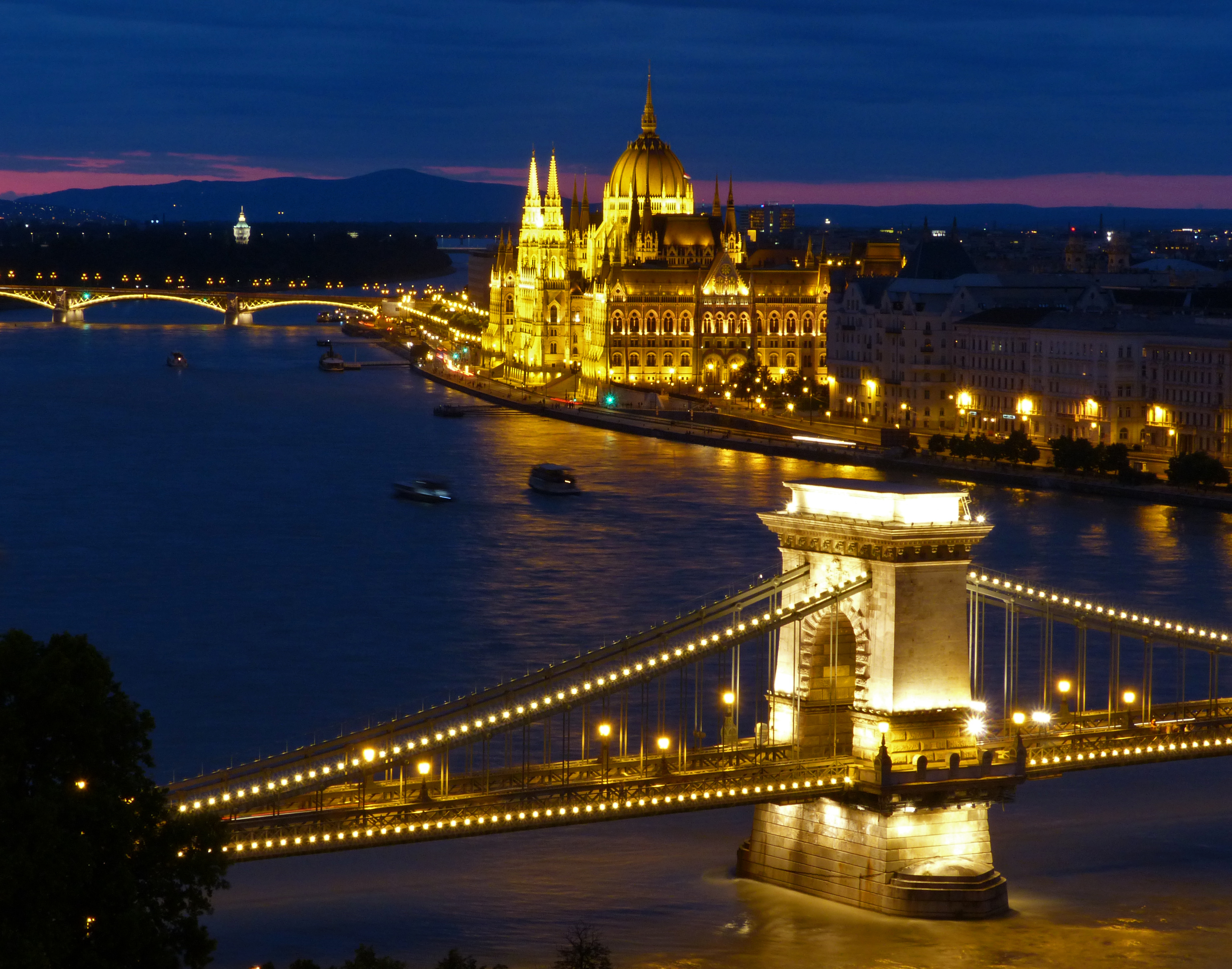 Kettenbrücke und Parlament in Budapest zur blauen Stunde